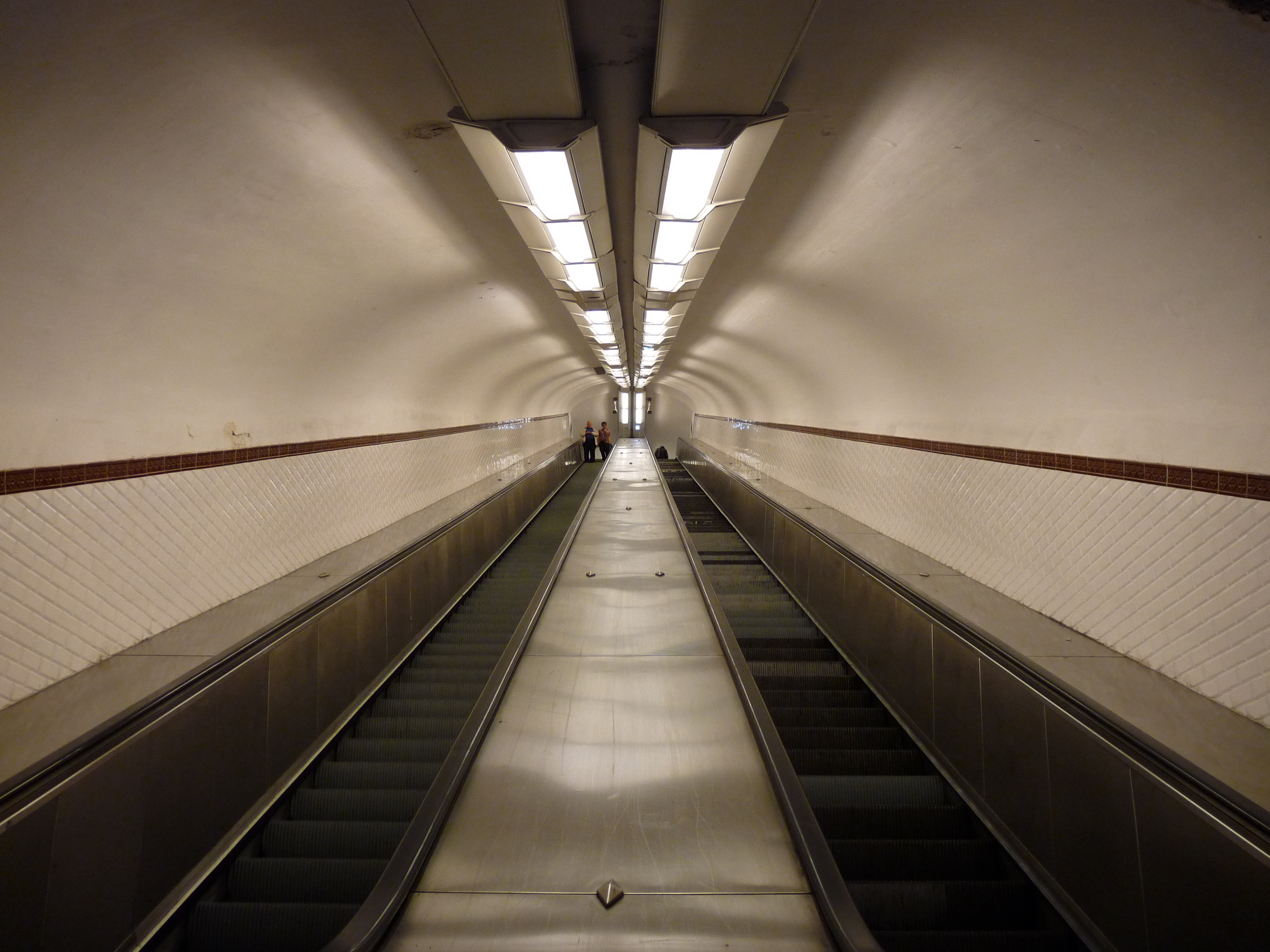 Le grand escalateur de la station de métro Télégraphe à Paris